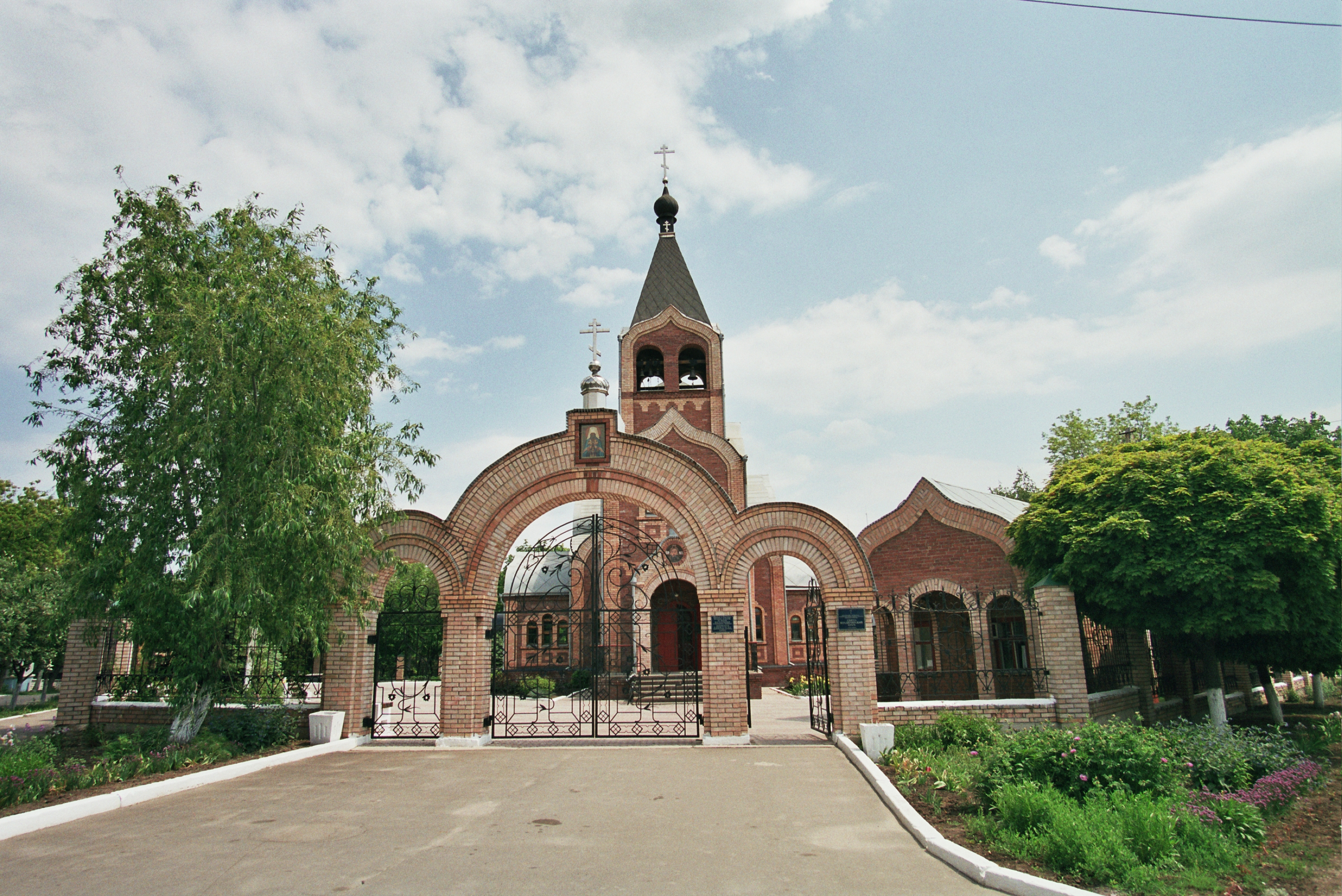 Фото Анастасии Федоренко